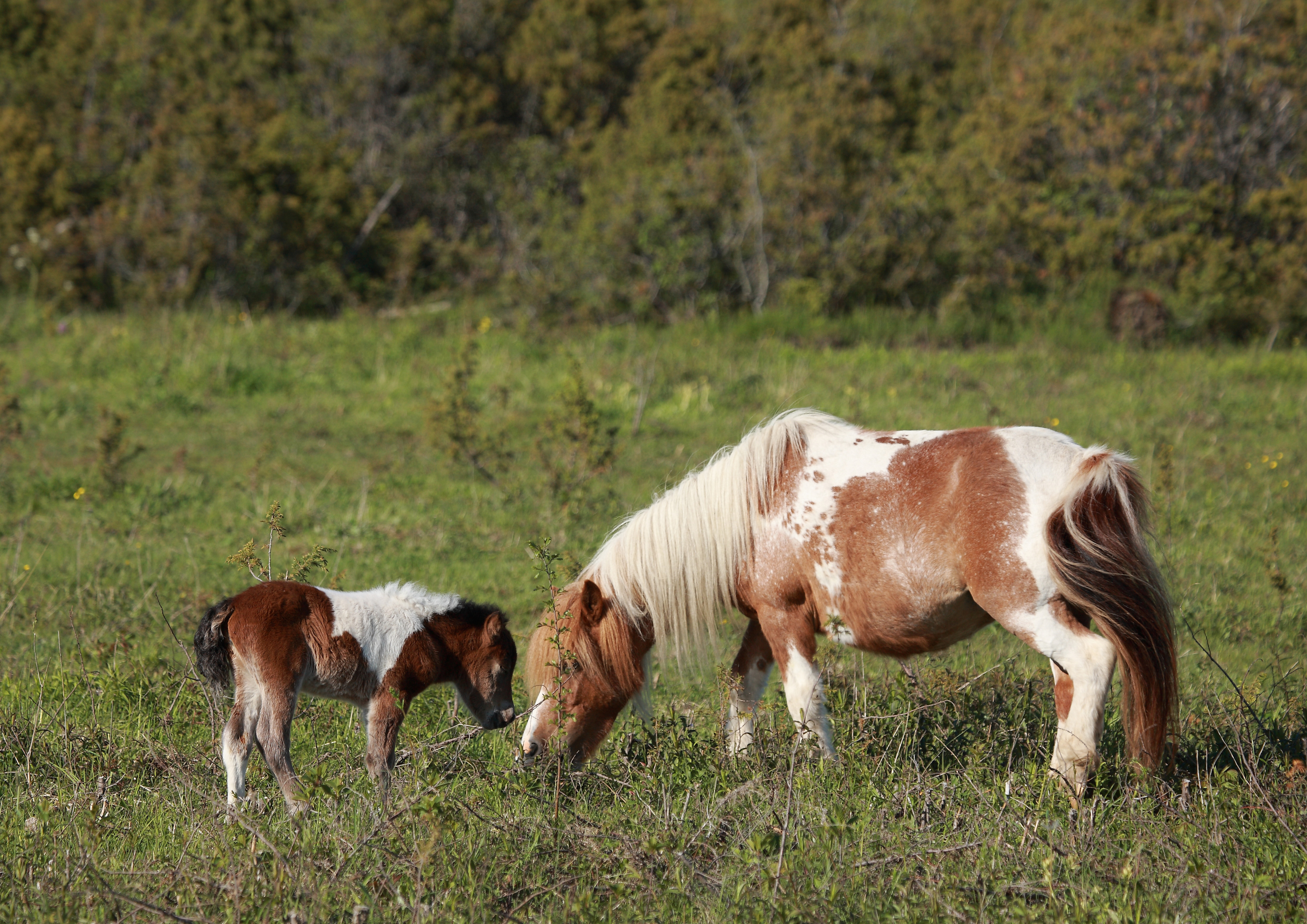 Hobused Matsalu rahvuspargis.